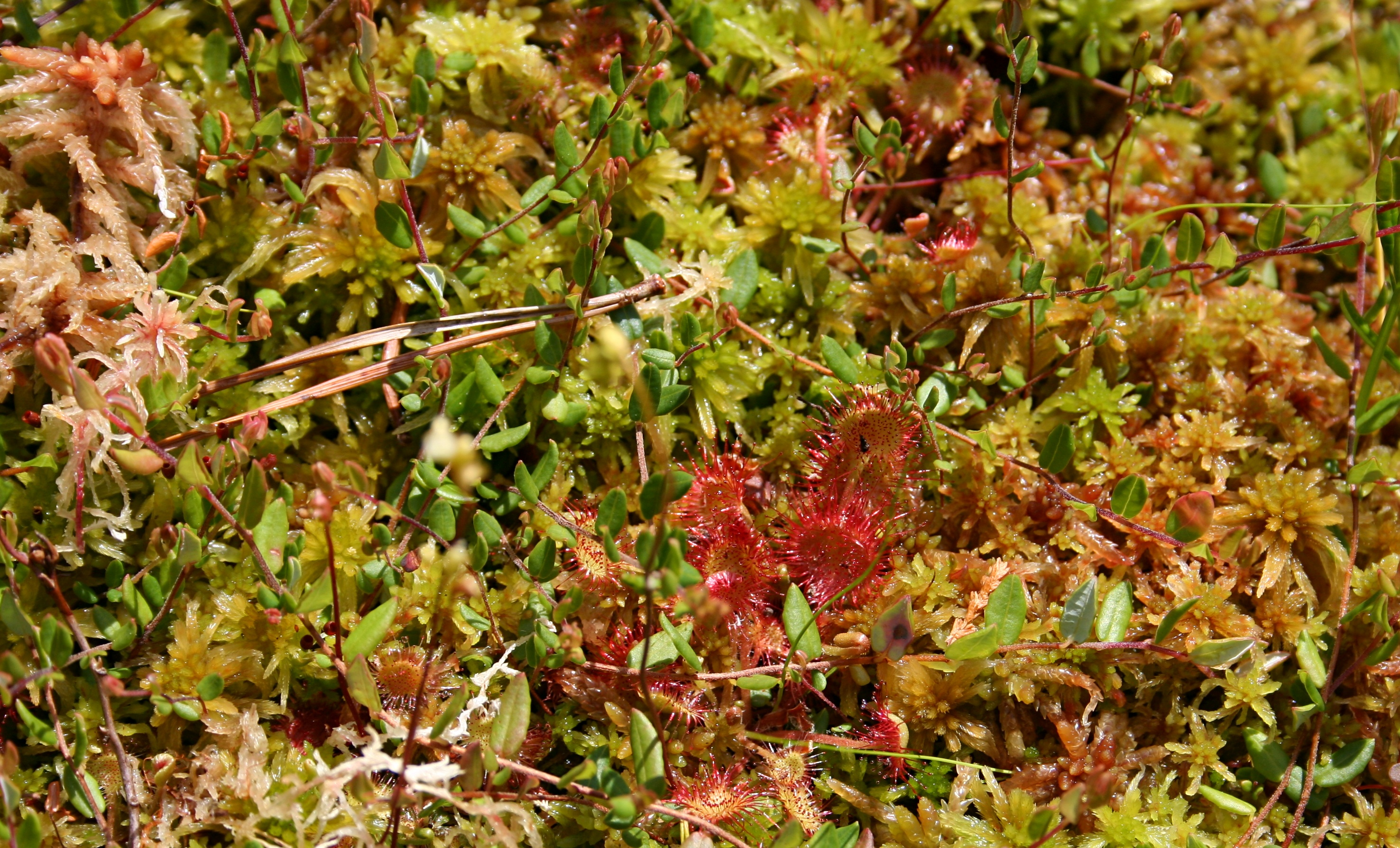 Zbiorowisko roslinne w rezerwacie Dury rzędu Sphagnetalia magellanici